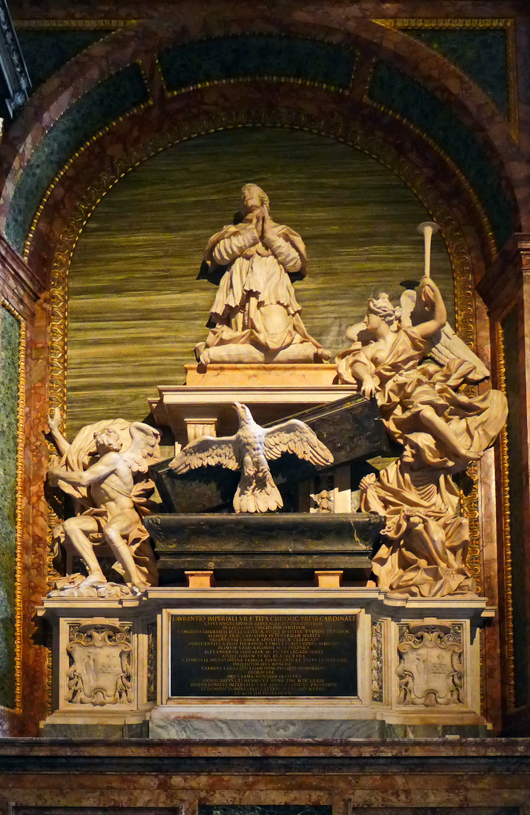 Sant'Agostino (Rom); Grabmonument für Kardinal Lorenzo Imperiali